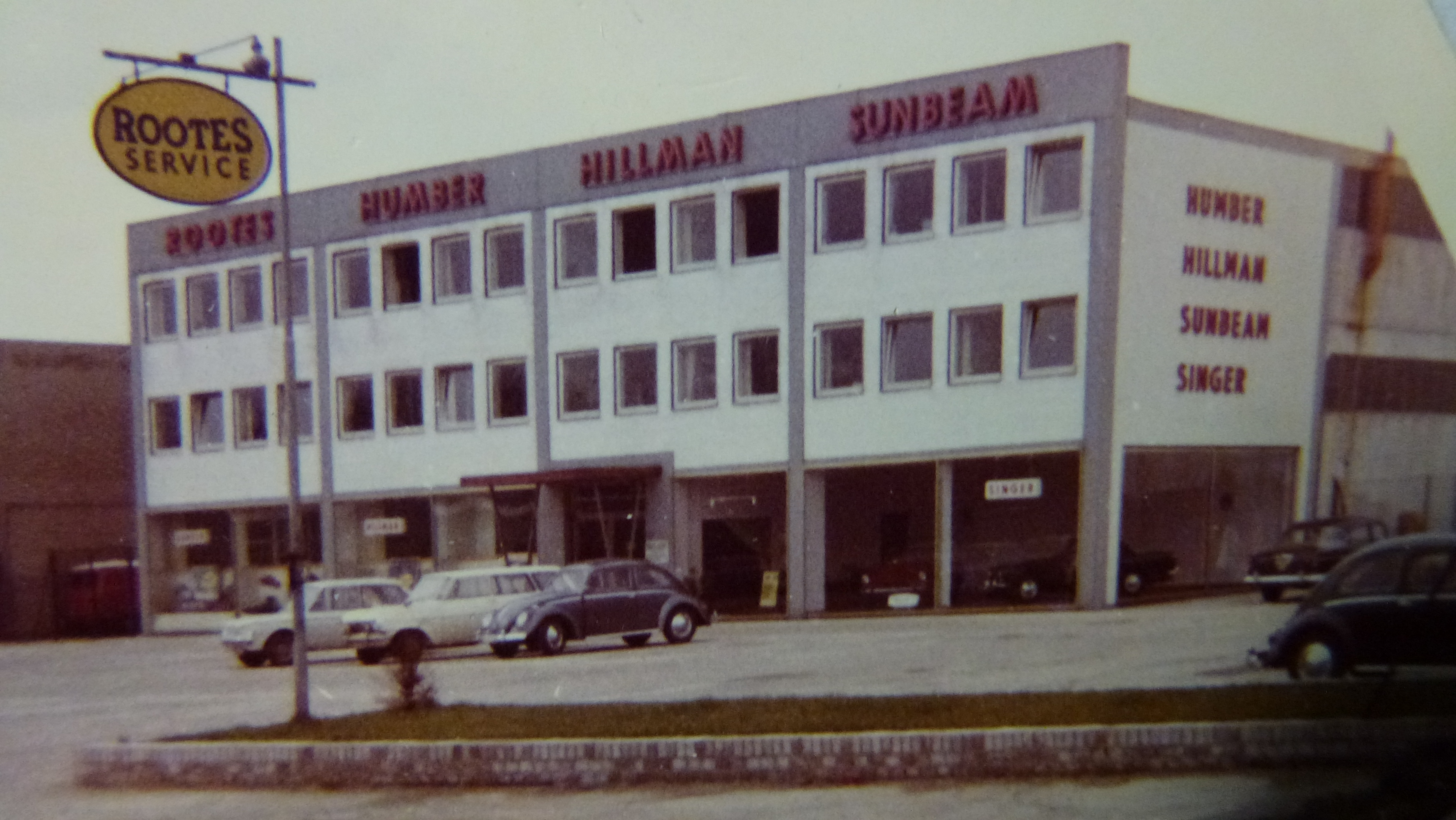 Verkauf und Kundendienst wurden auf der Oberhausener Straße 17 in Düsseldorf- Rath zusammen gelegt